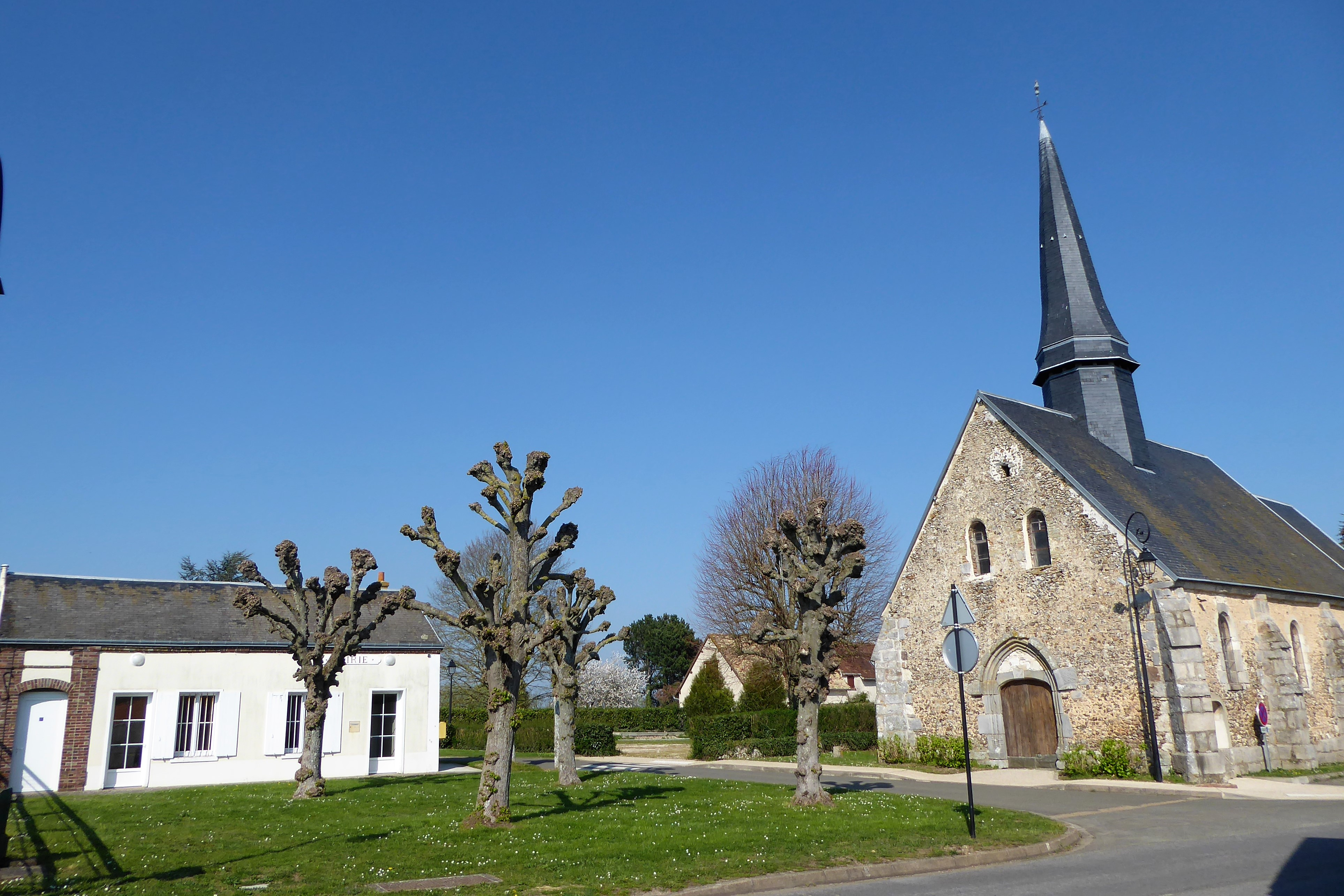 Mairie et église Saint-Blaise d'Havelu, Eure-et-Loir, France.